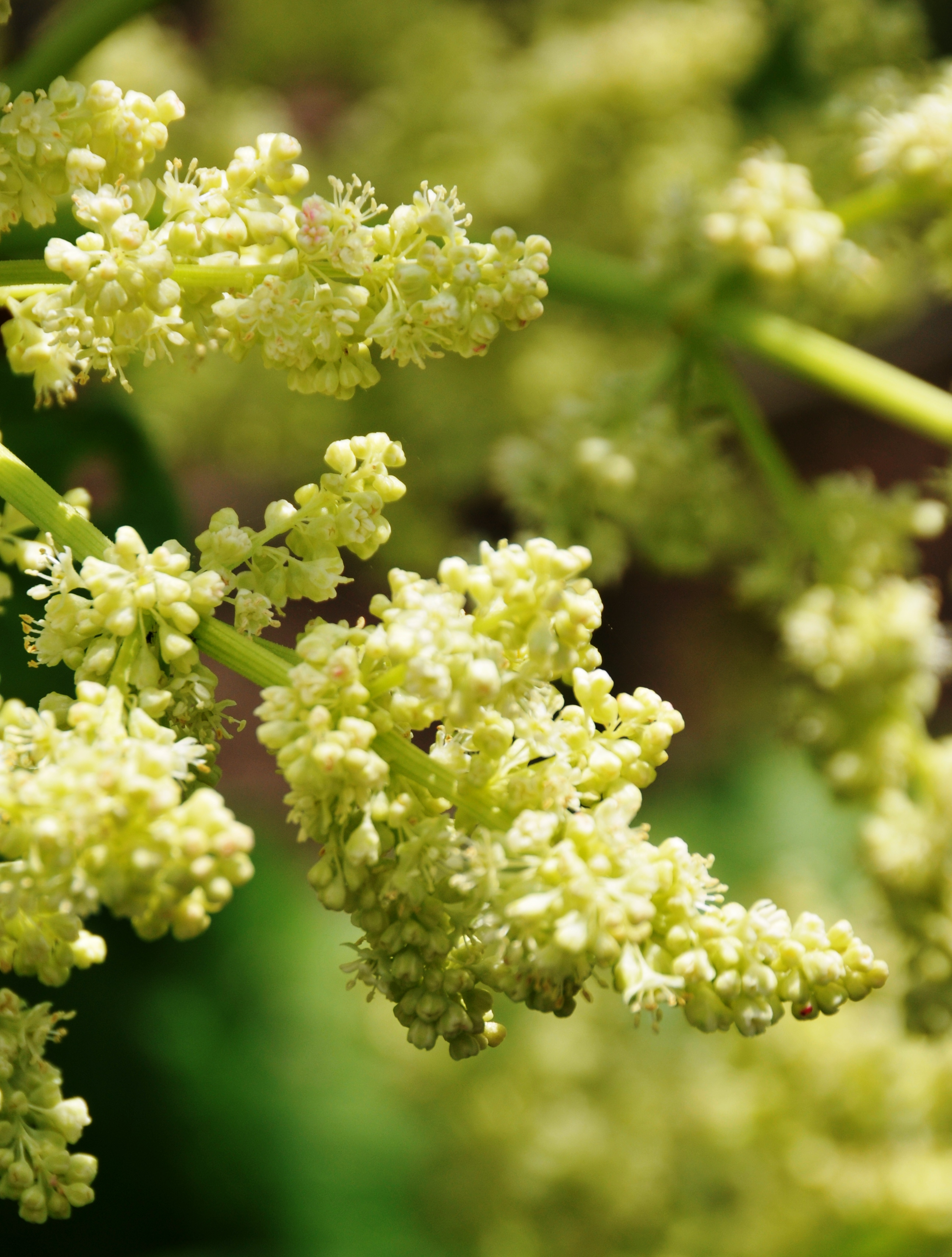 Rhabarber, Blütenrispe